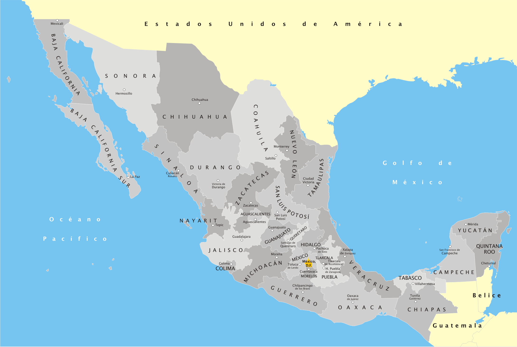 Mapa de México, con división política, nombres y capitales estatales